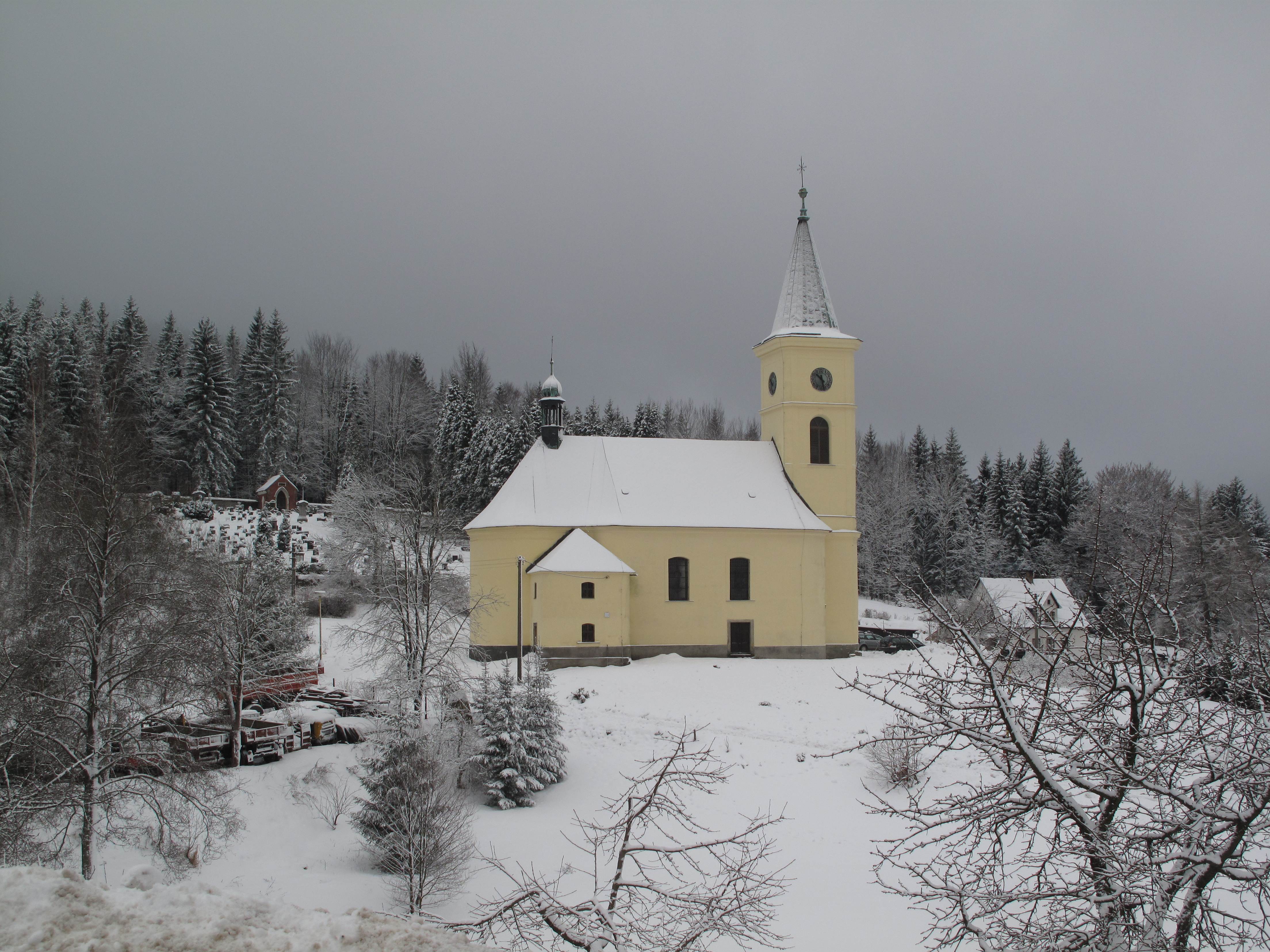 Albrechtice v Jizerských horách